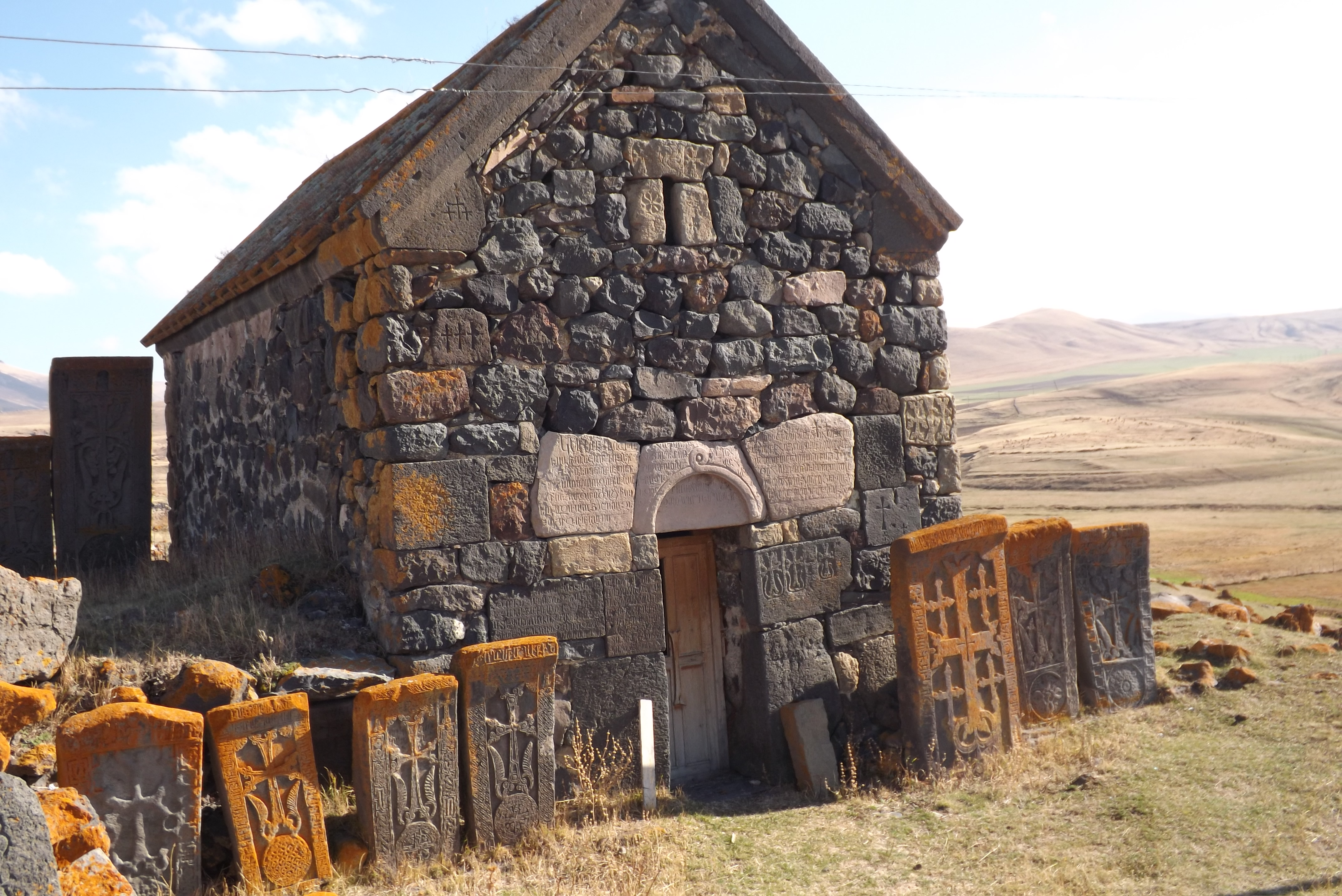 Daşkənd — Qərbi Azərbaycanın Göyçə mahalında kənd.